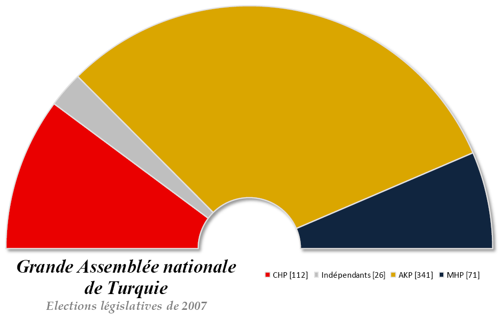 Composition du parlement turque après les législatives de 2007.